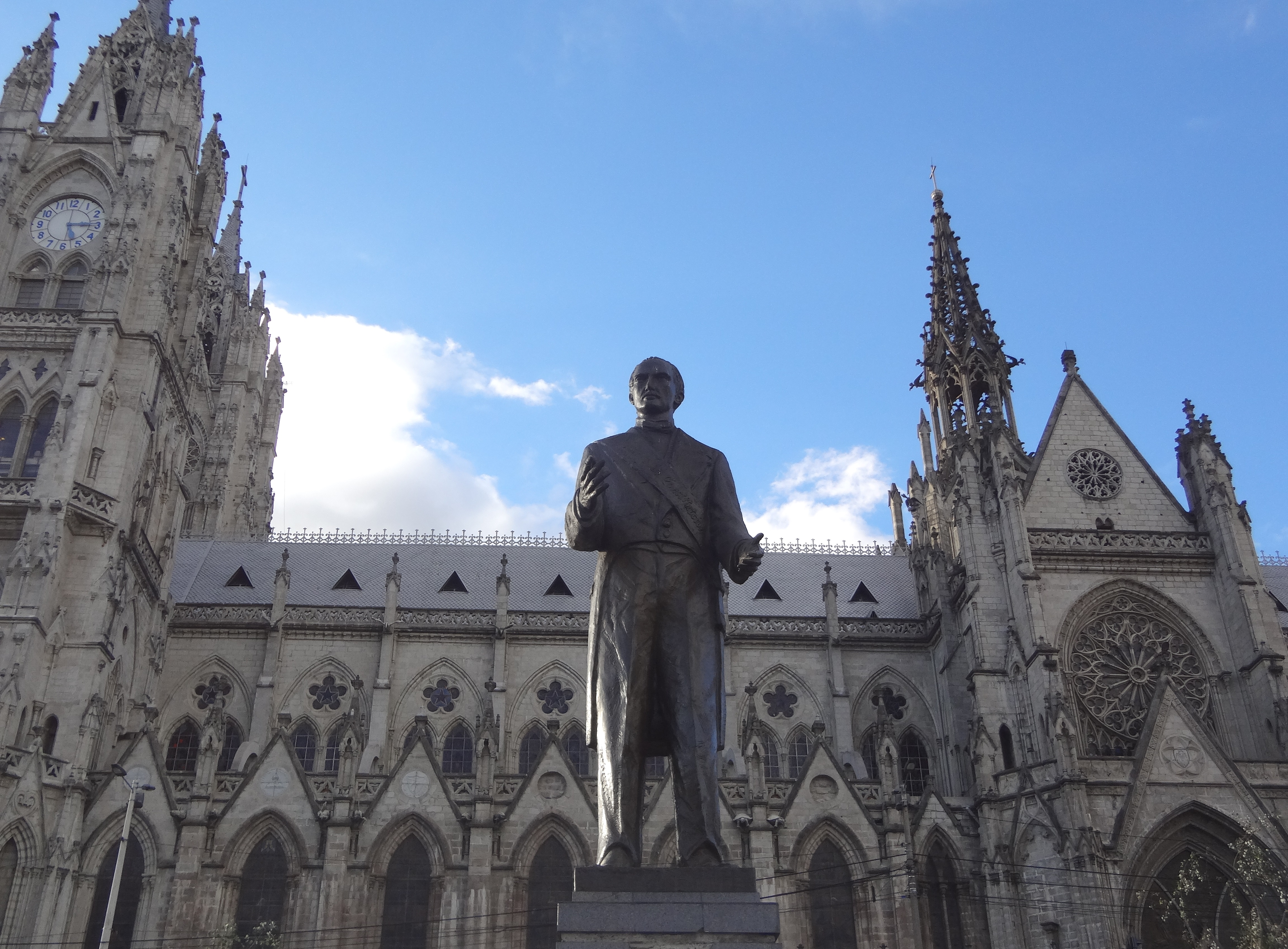 Monumento de García Moreno en la plaza que lleva su mismo nombre. Detrás la Basílica del Voto Nacional